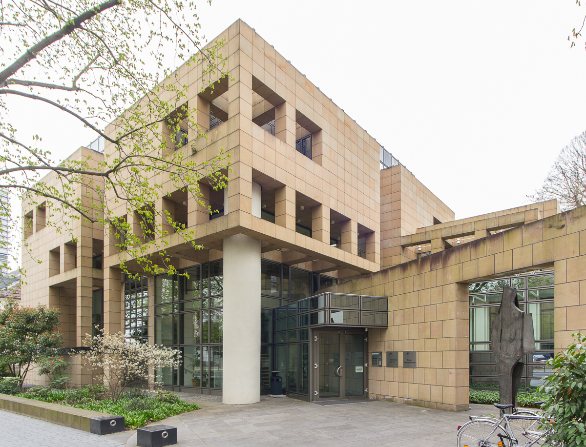 Ehem. Landesvertretung Rheinland-Pfalz, Heussallee 22–24, Bonn